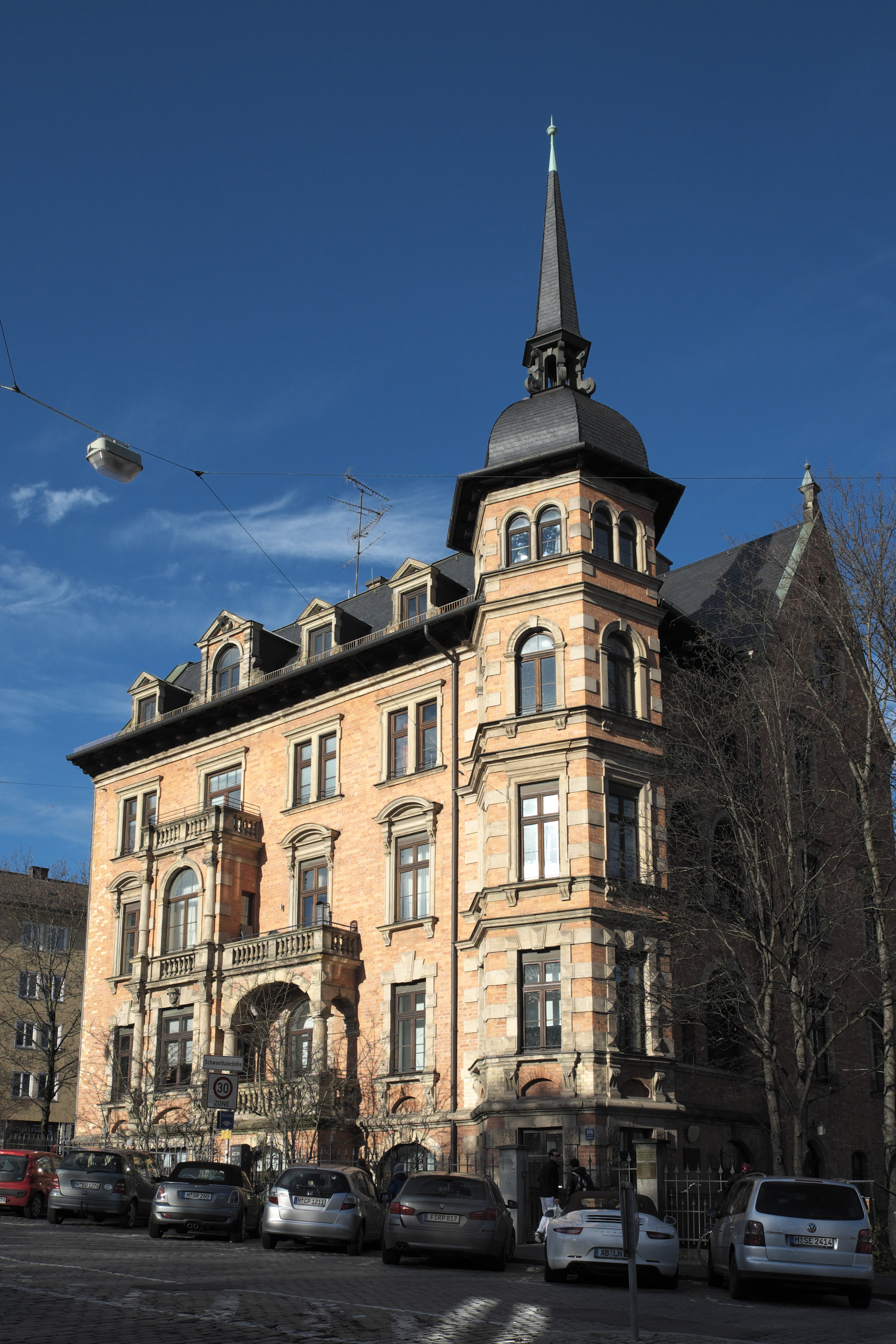 Mietshaus in der Schwanthalerstraße 106 im Stadtbezirk Schwanthalerhöhe in München (Bayern/Deutschland), 1878/79 von Georg von Hauberrisser erbaut